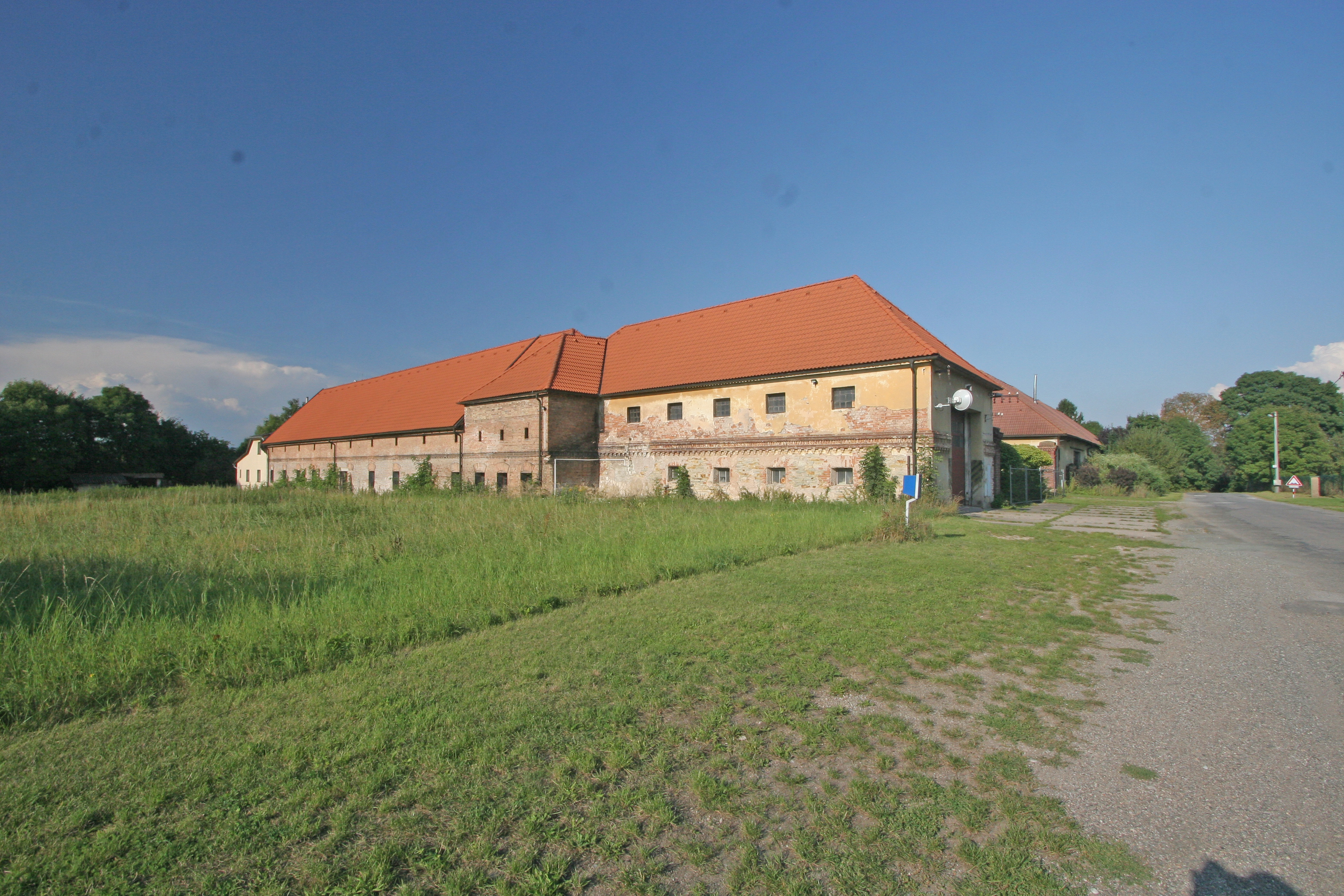 Doubravice u České Skalice čp 1